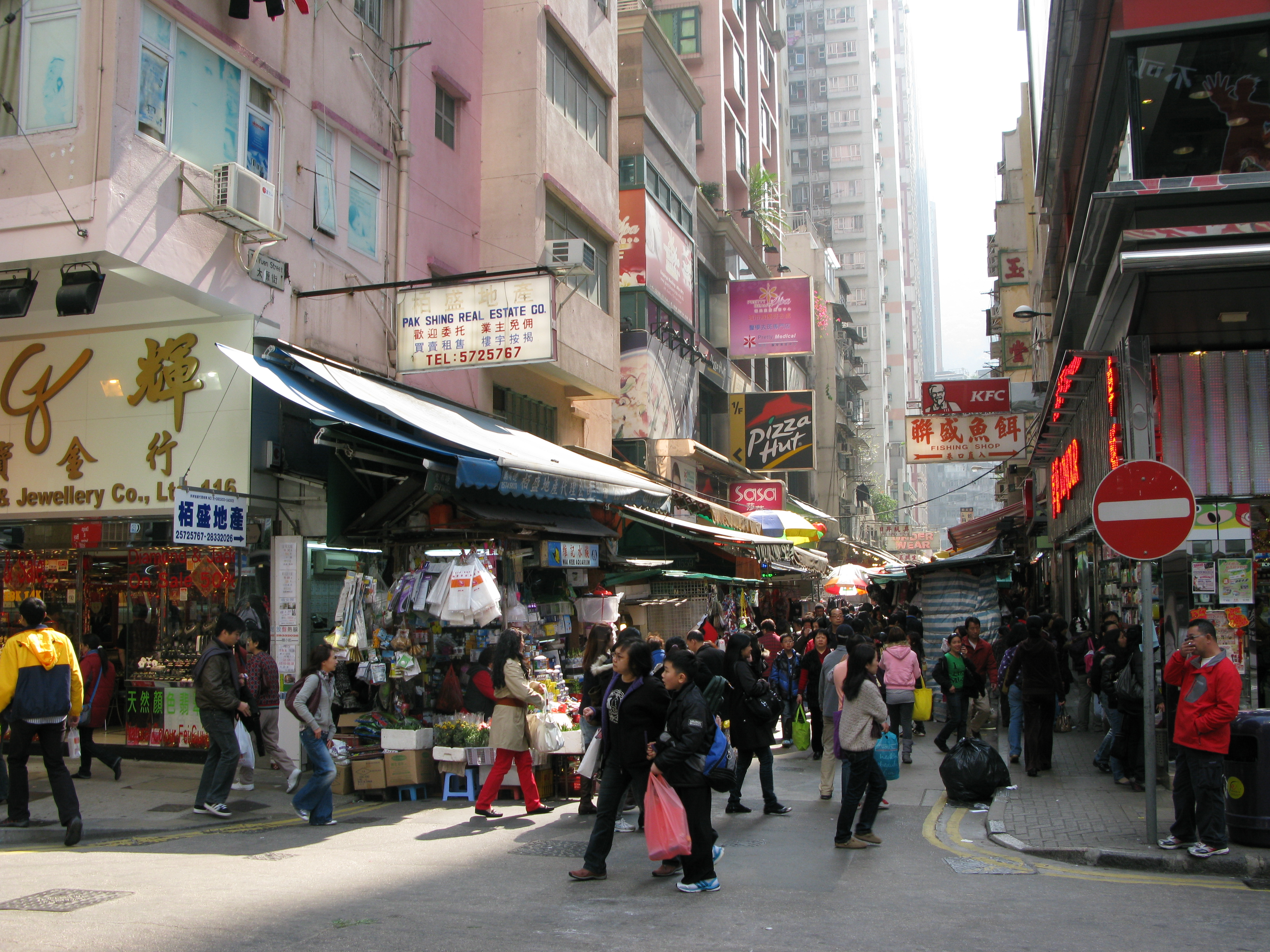 中文（香港）: 香港灣仔太原街，從莊士敦道望向方向